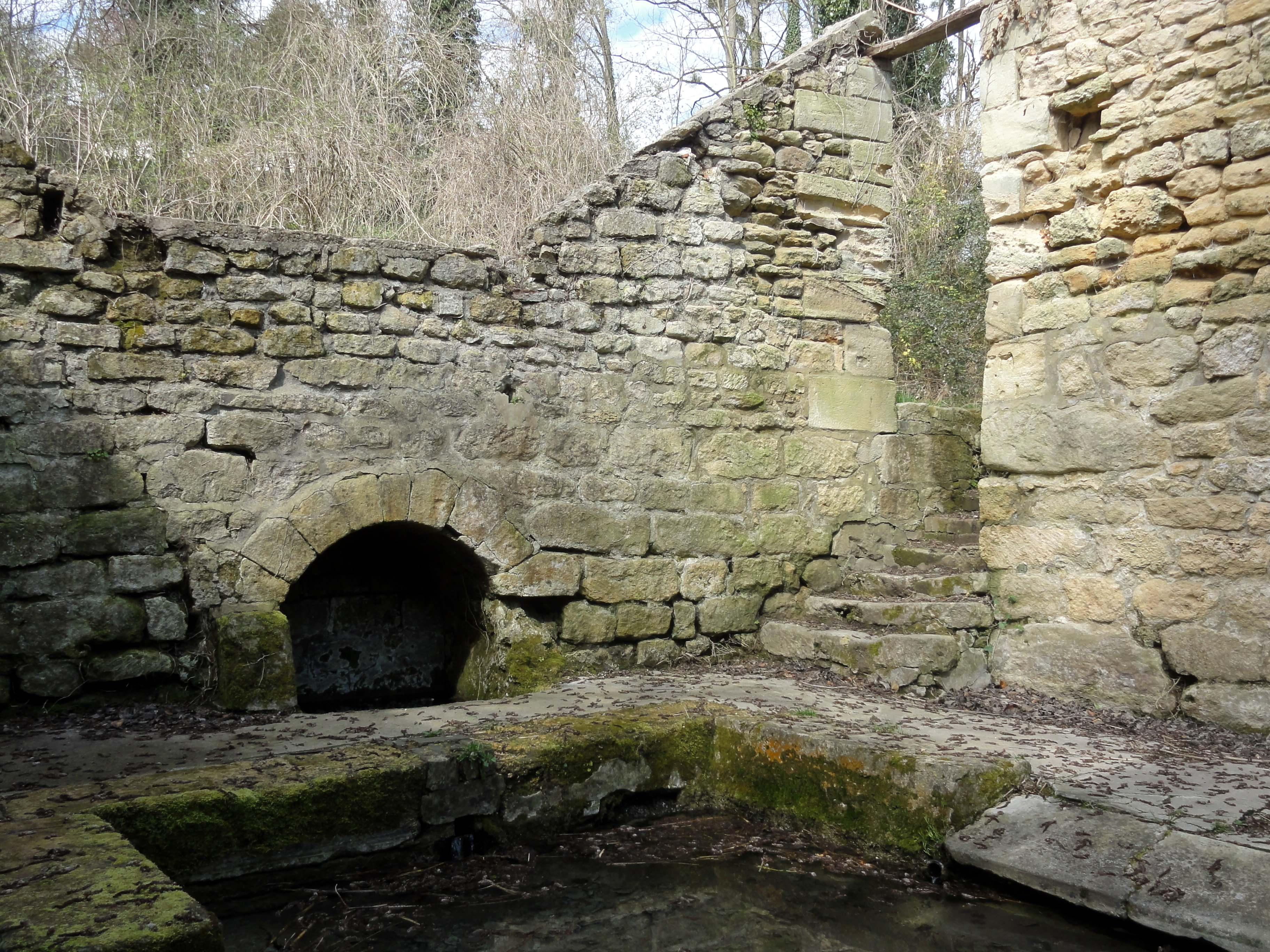 Lavoir à l'abandon près de la rue du Cornouiller prolongée, dans la vallée aux Moines.